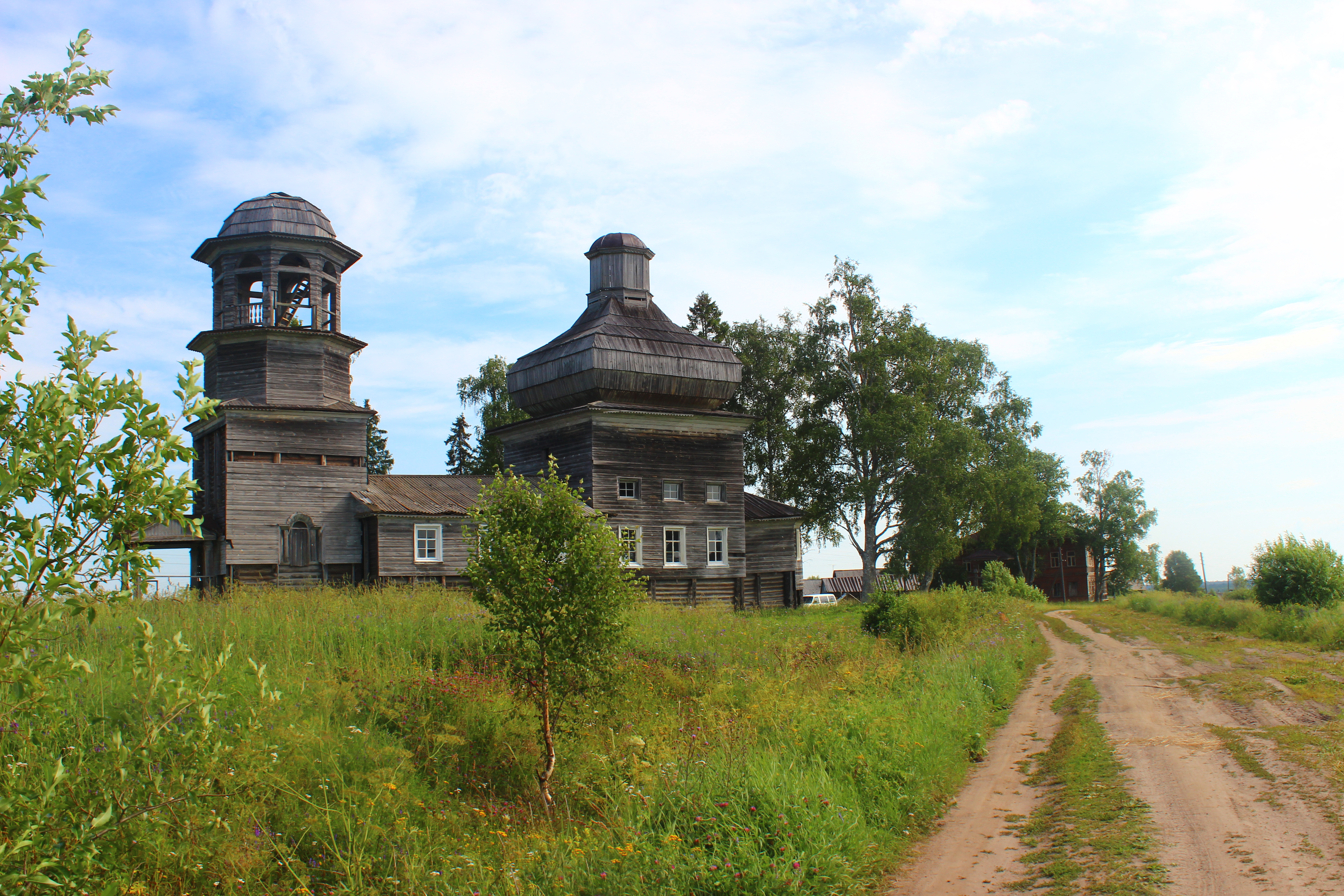 (Архангельская область, Онега, деревня Поле)